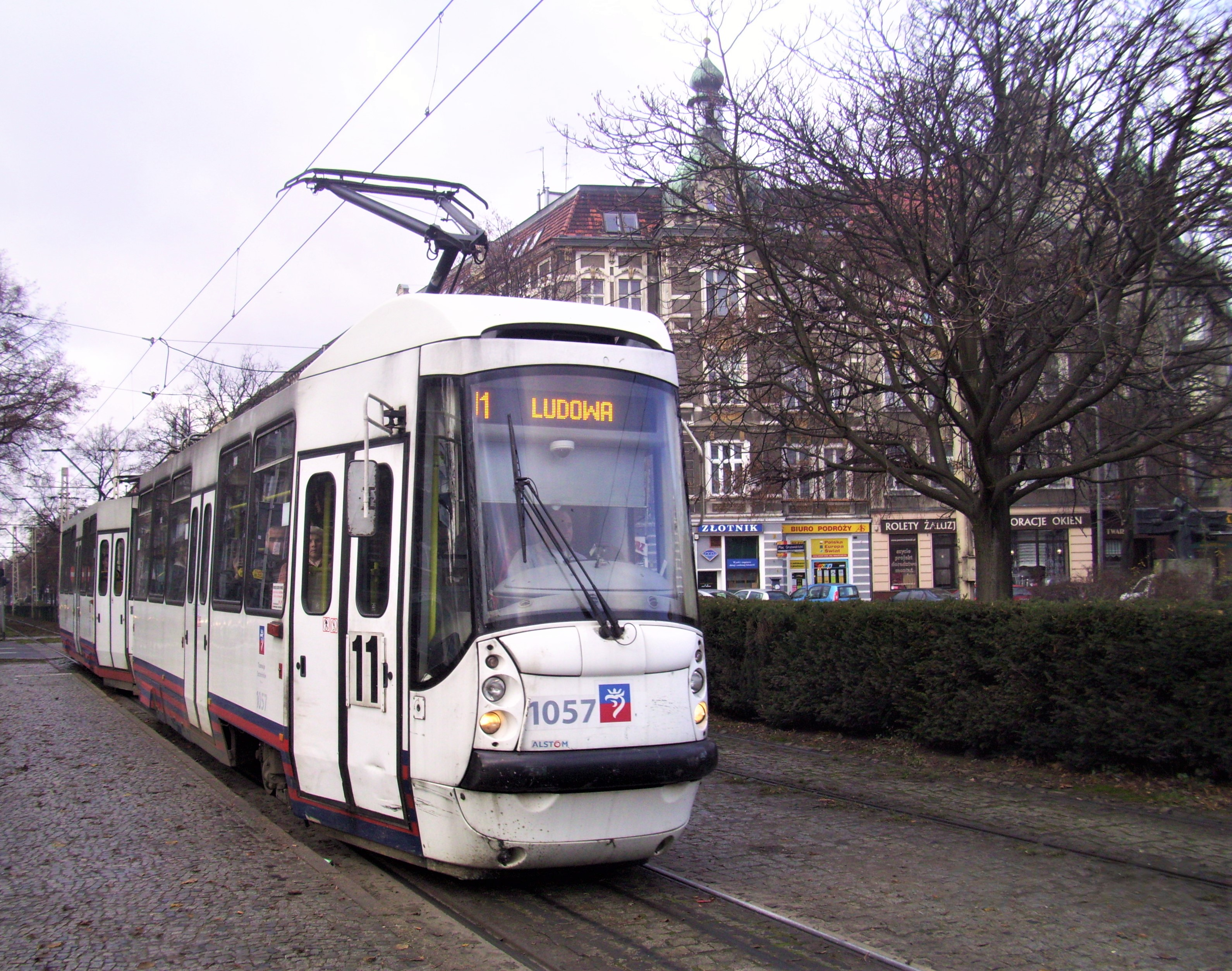 Tramwaj w Szczecinie